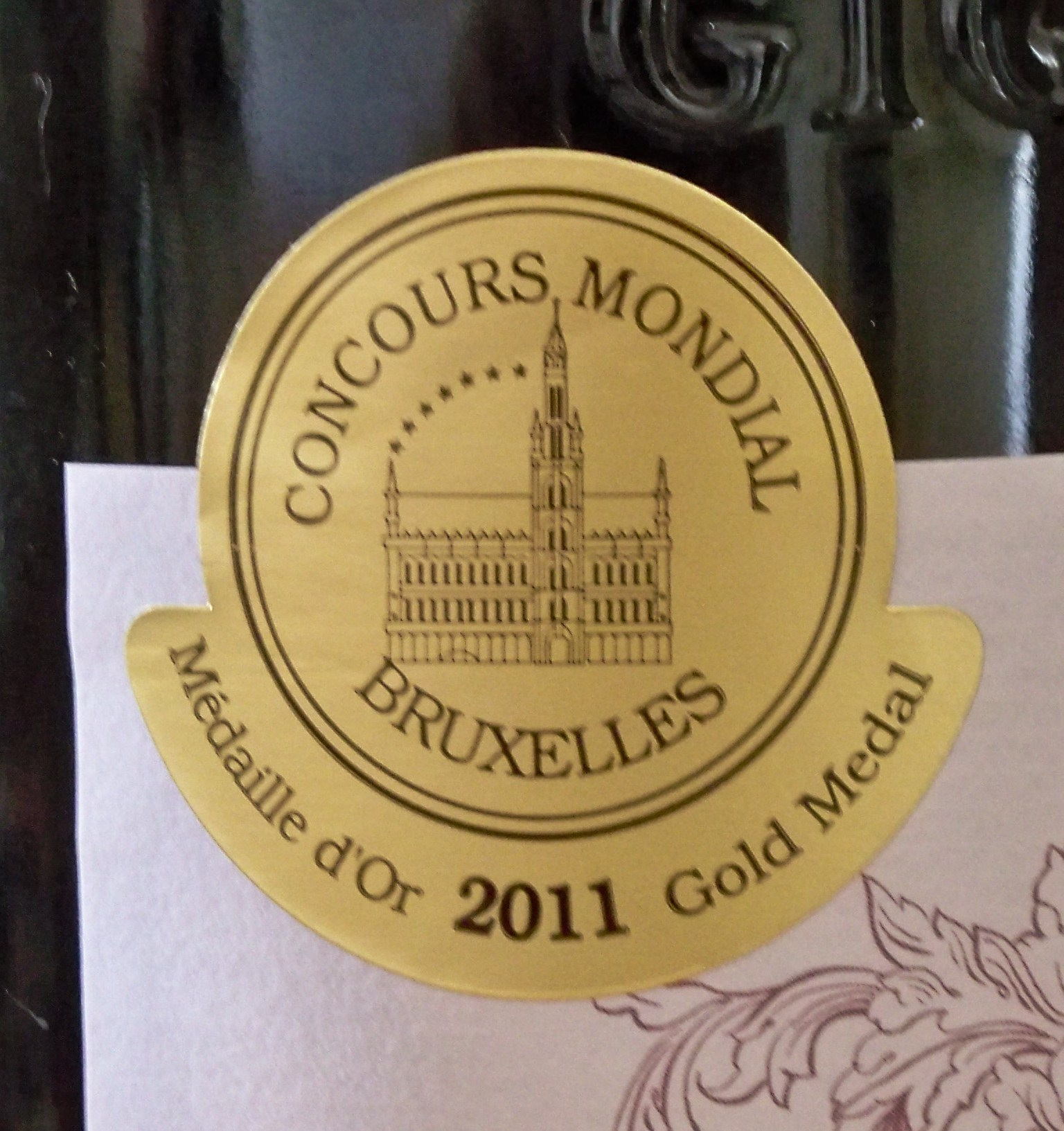 médaille d'or du concours des vins de Bruxelles